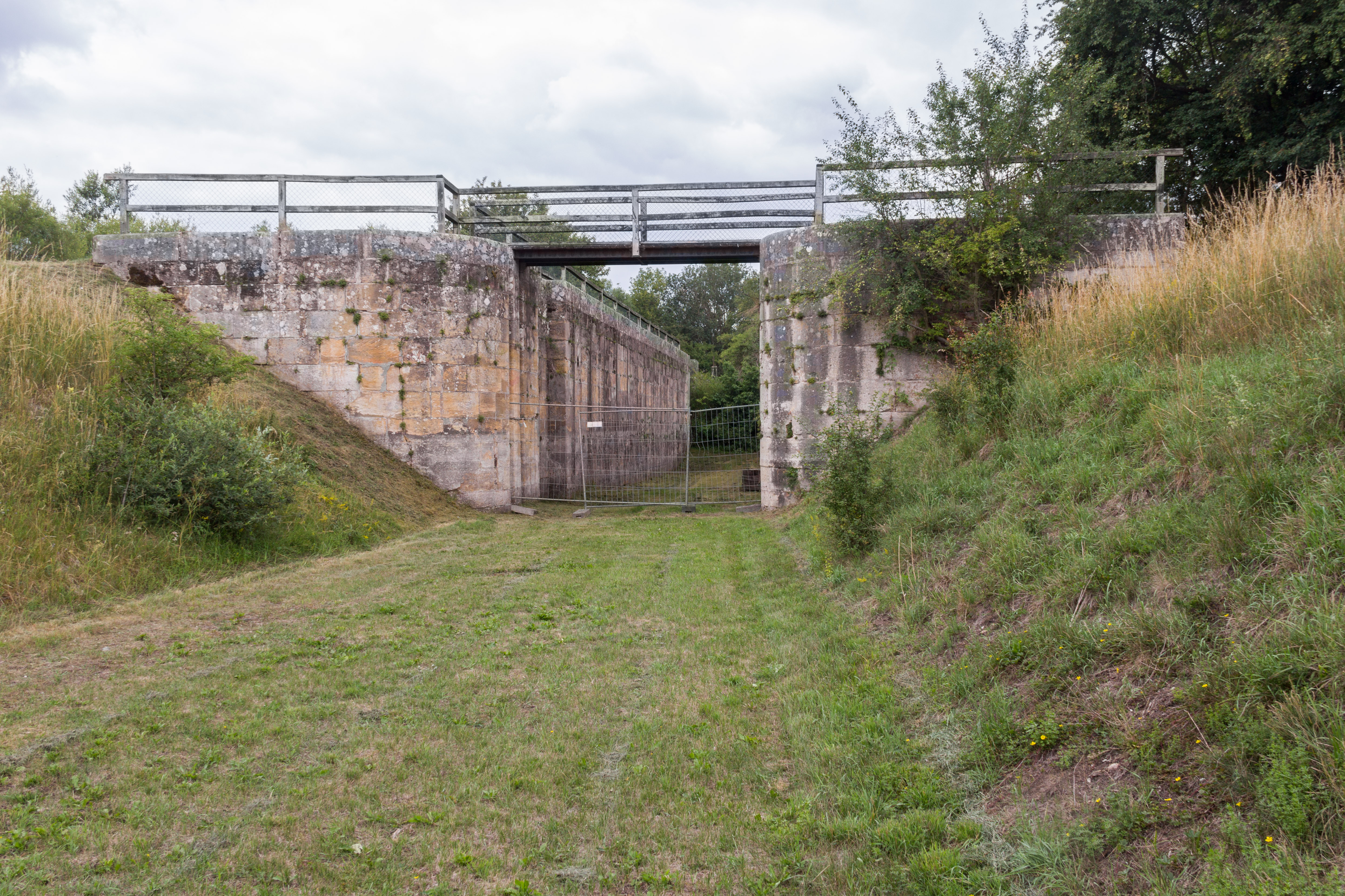 Ludwig-Donau-Main-Kanal, Schleuse 22, Beilngries